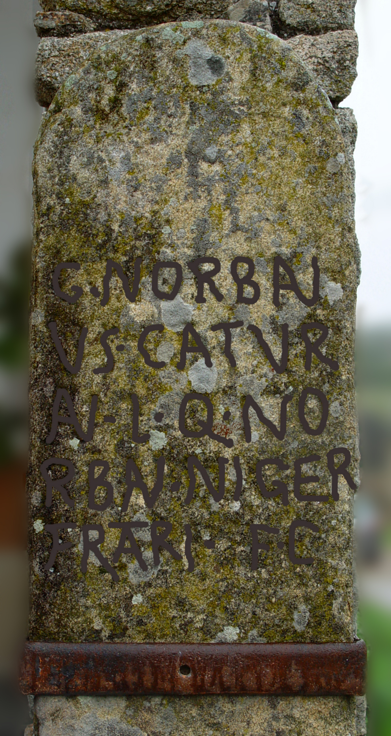 Inscripción funeraria romana procedente Ibahernando (Cáceres, españa9 depositada en una colección particular de la localidad, correspondiente con CPILCaceres 301 = CILCaceres 2, 551: G(aius) Norban/us Catur(o) / an(norum) L Q(uintus) No/rban(us) Niger / fratri f(aciendum) c(uravit)